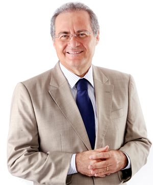 Renan Calheiros, político filiado ao Partido do Movimento Democrático Brasileiro (PMDB) e atual presidente do Senado e do Congresso Nacional.